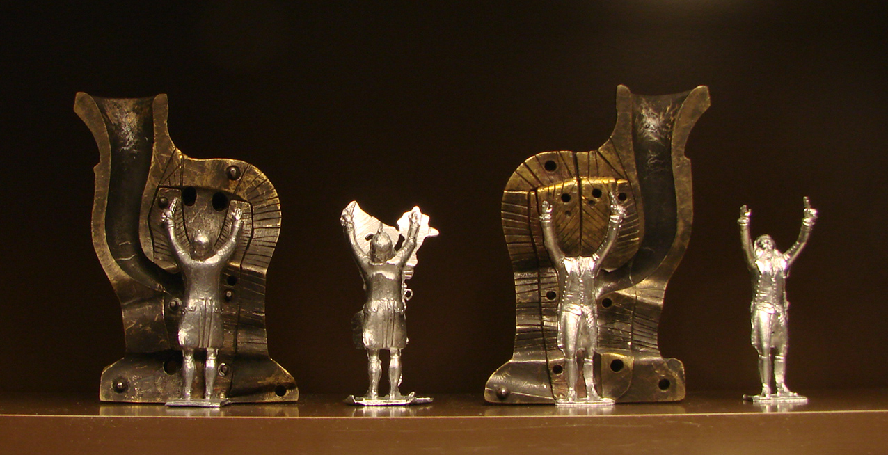 Fabrication d'une figurine:le moule.Musée de la Figurine historique à Compiègne.